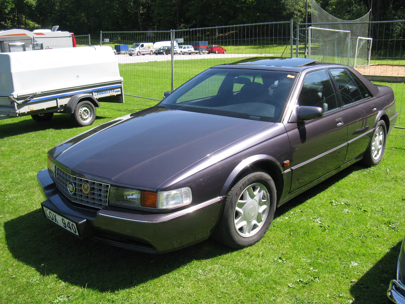 Cadillac Seville